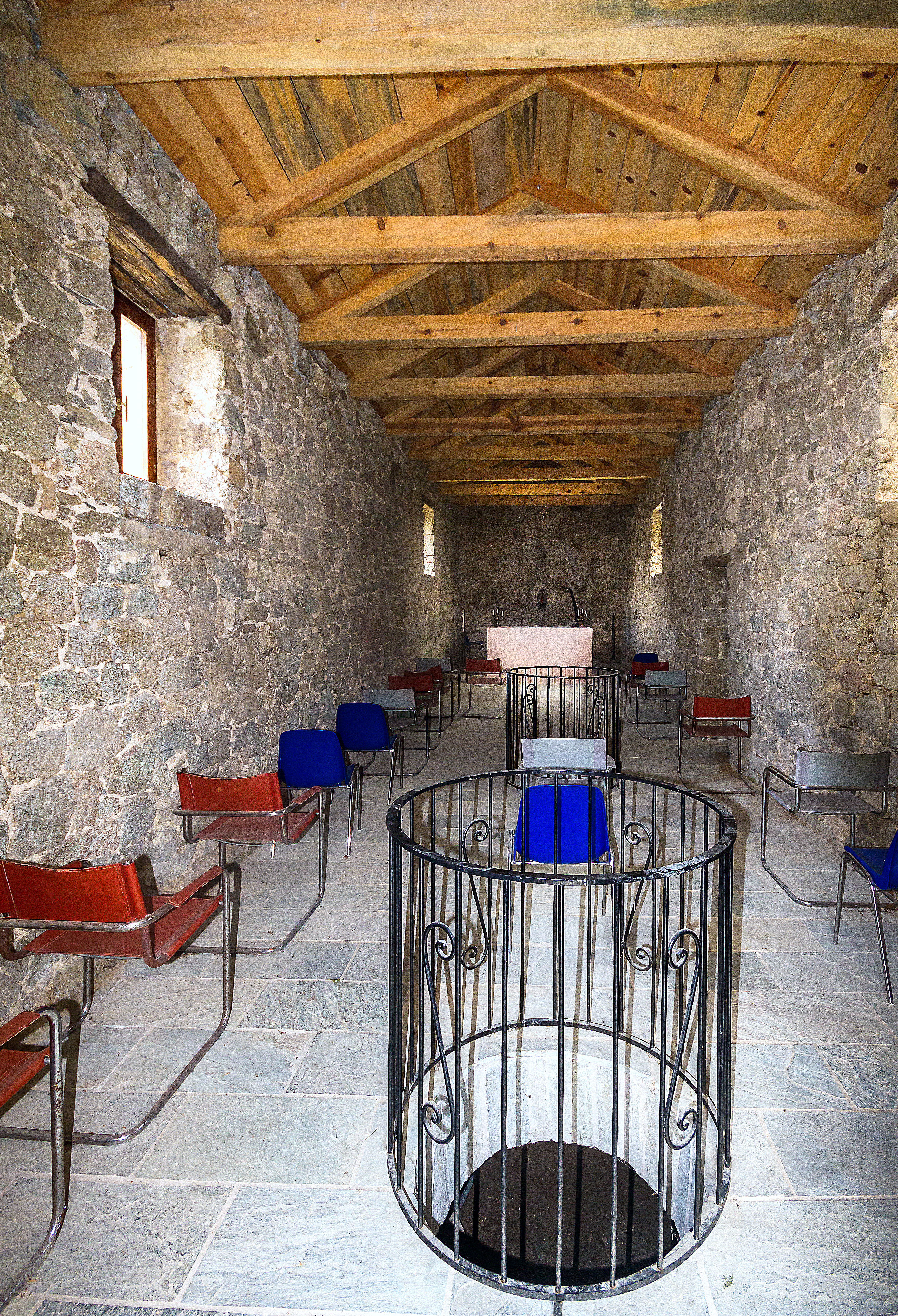 Intérieur de la chapelle Sainte lucie d'Isulacciu di Fiurmorbu